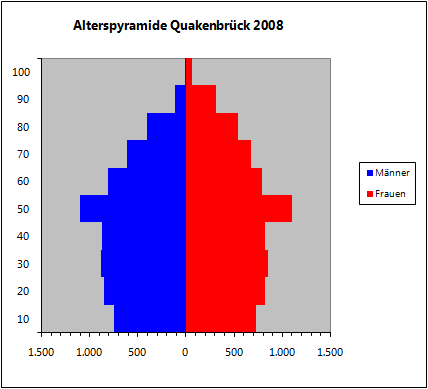 Alterspyramide der Bevölkerung der Stadt Quakenbrück 2008